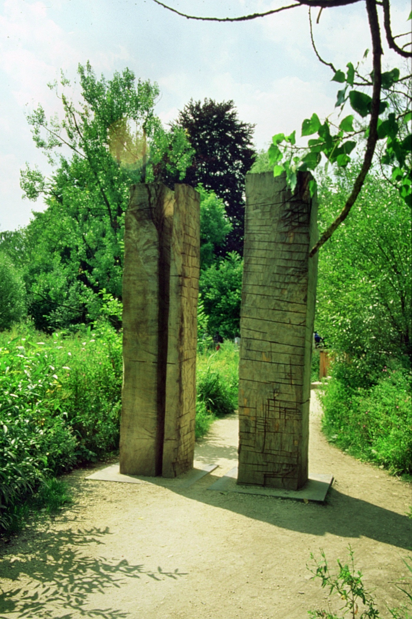 Landesgartenschau 2000 in Memmingen